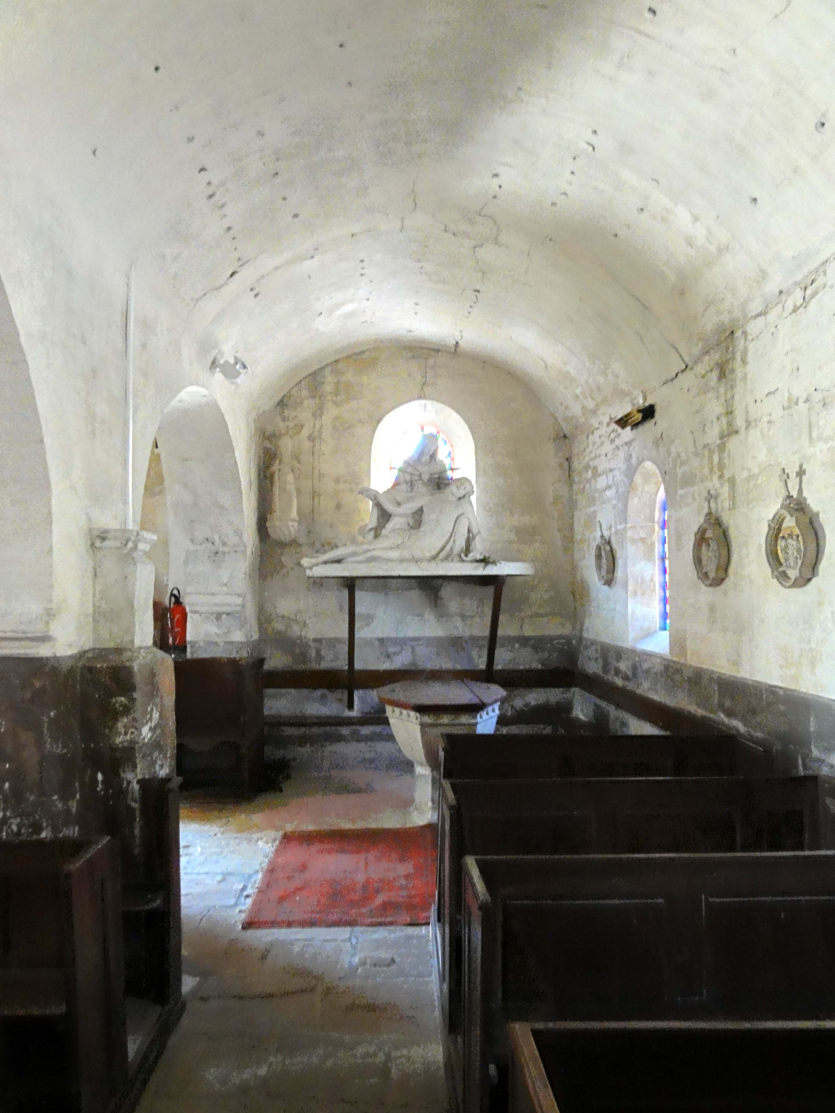 Intérieur de l'église Saint-Martin de Labbeville (voir titre).